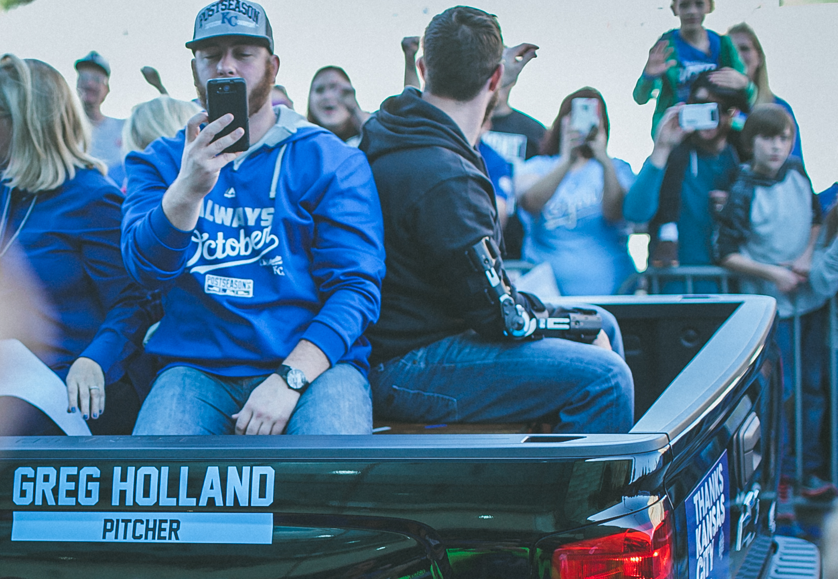 Royal Parade-56